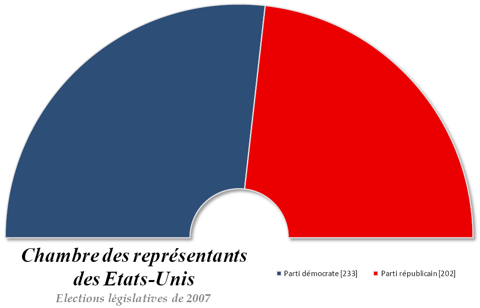 Composition de la Chambre des représentants des Etats-Unis d'Amérique en 2007 à l'issue des élections législatives.